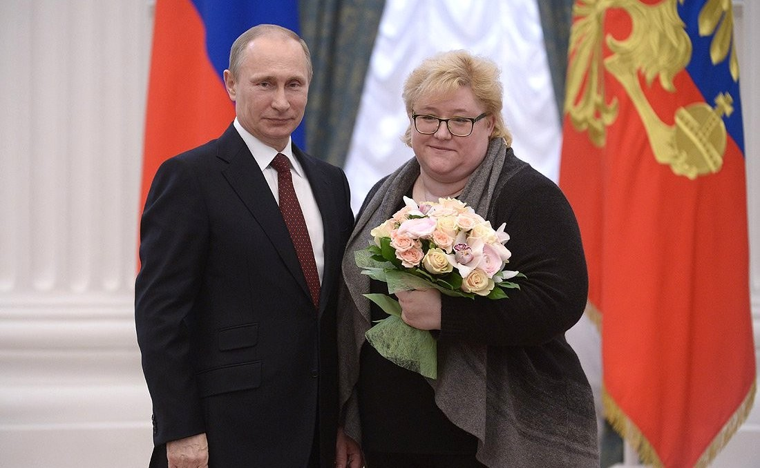 Вручение государственных наград Российской Федерации. Тренер-преподаватель по фигурному катанию на коньках государственного бюджетного образовательного учреждения дополнительного образования детей спортивной направленности города Москвы «Специализированная детско-юношеская спортивная школа олимпийского резерва «Воробьёвы горы» Нина Мозер награждена орденом «За заслуги перед Отечеством» IV cтепени.